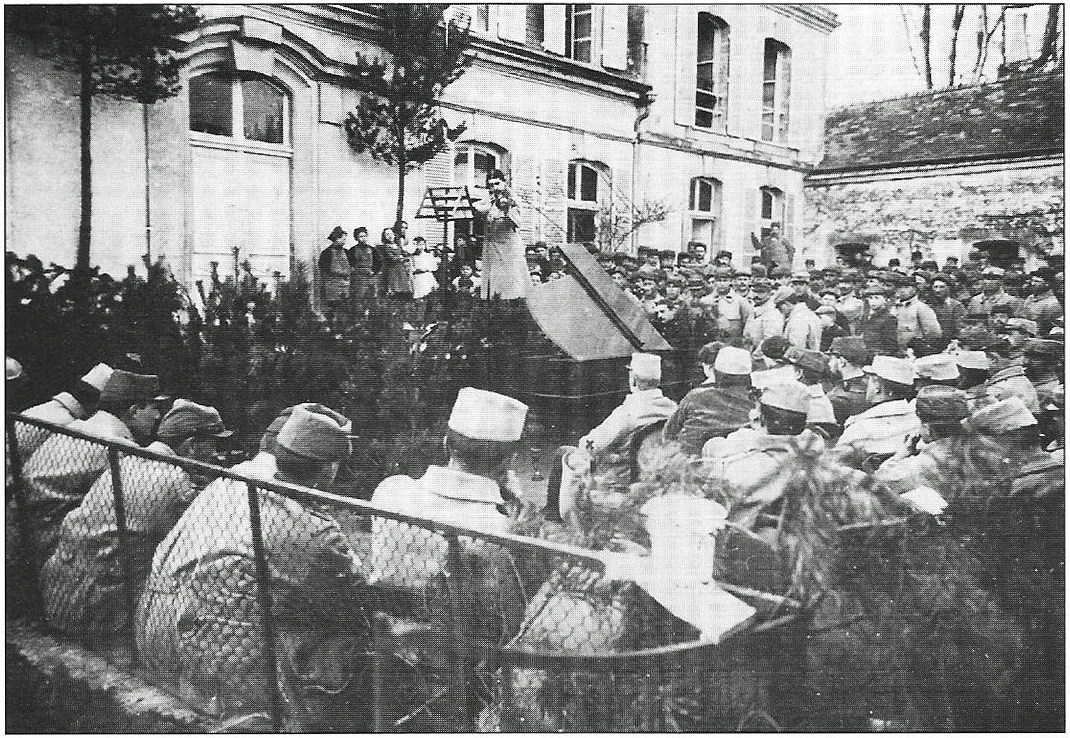 à Vandeuil.